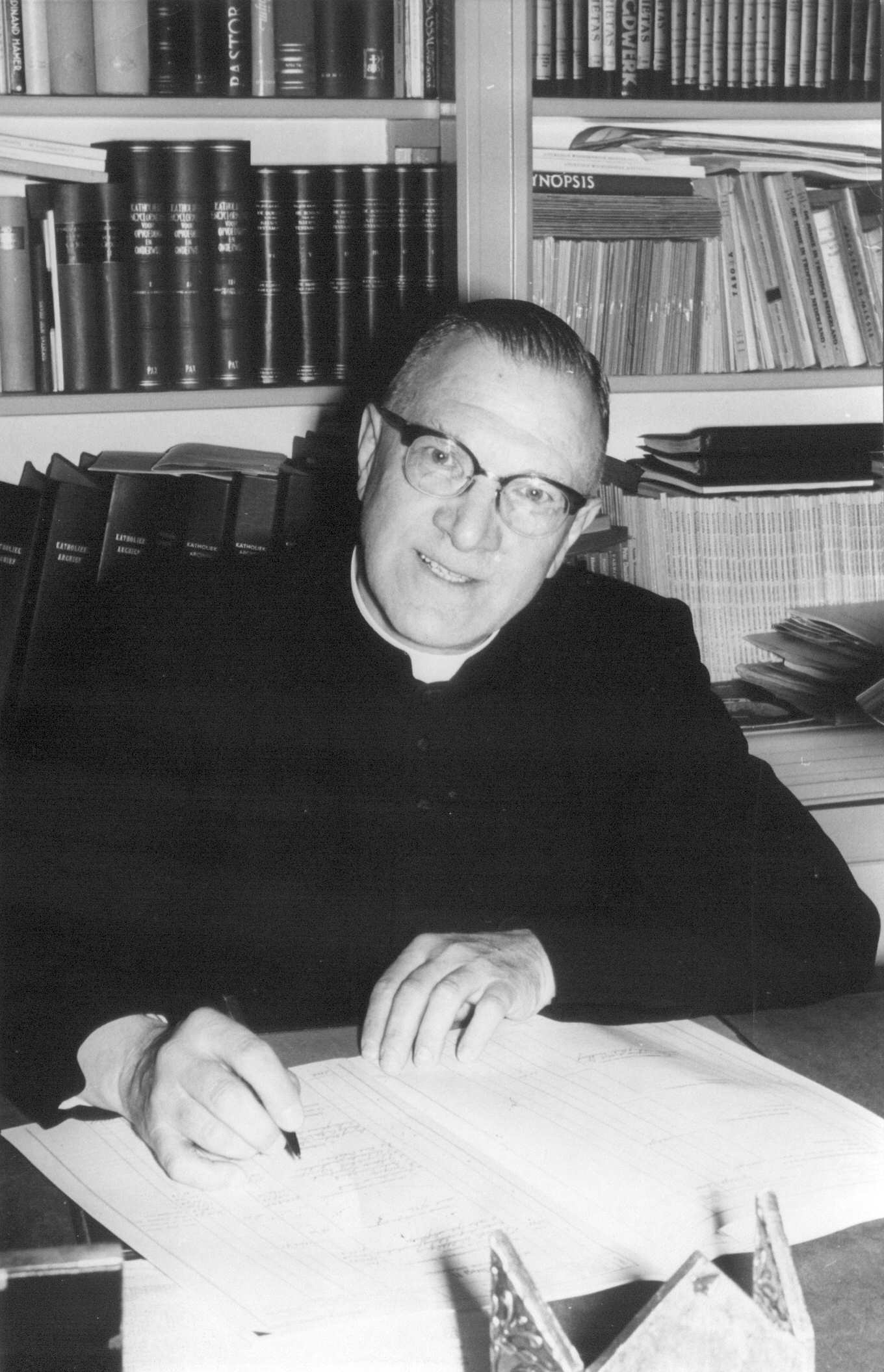 Deken van Dyck in zijn studeerkamer